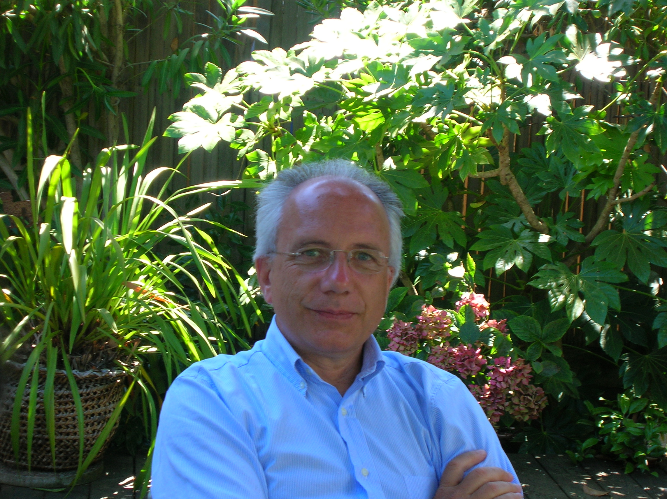 Vice Rector (Research) Full professor of Political Science at LUISS "Guido Carli" di Roma